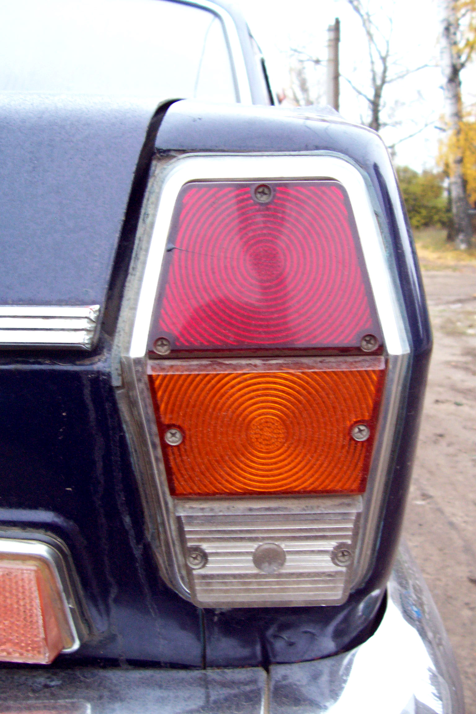 Gaz-24-taillight